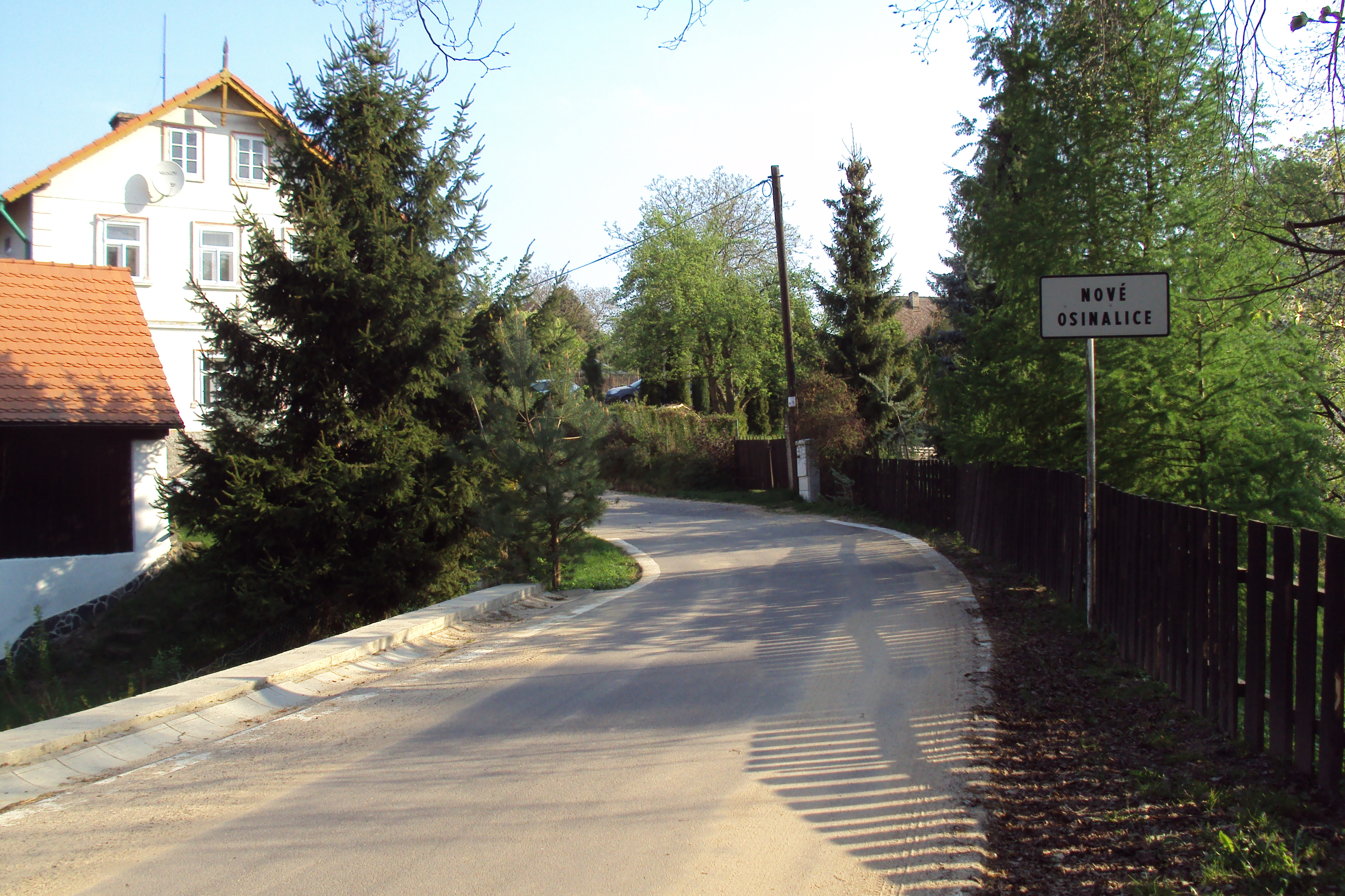 Vesnička Nové Osinalice na Kokořínsku má jednu ulici. Vlevo dům čp. 125 (dvojdům s domem čp. 26).